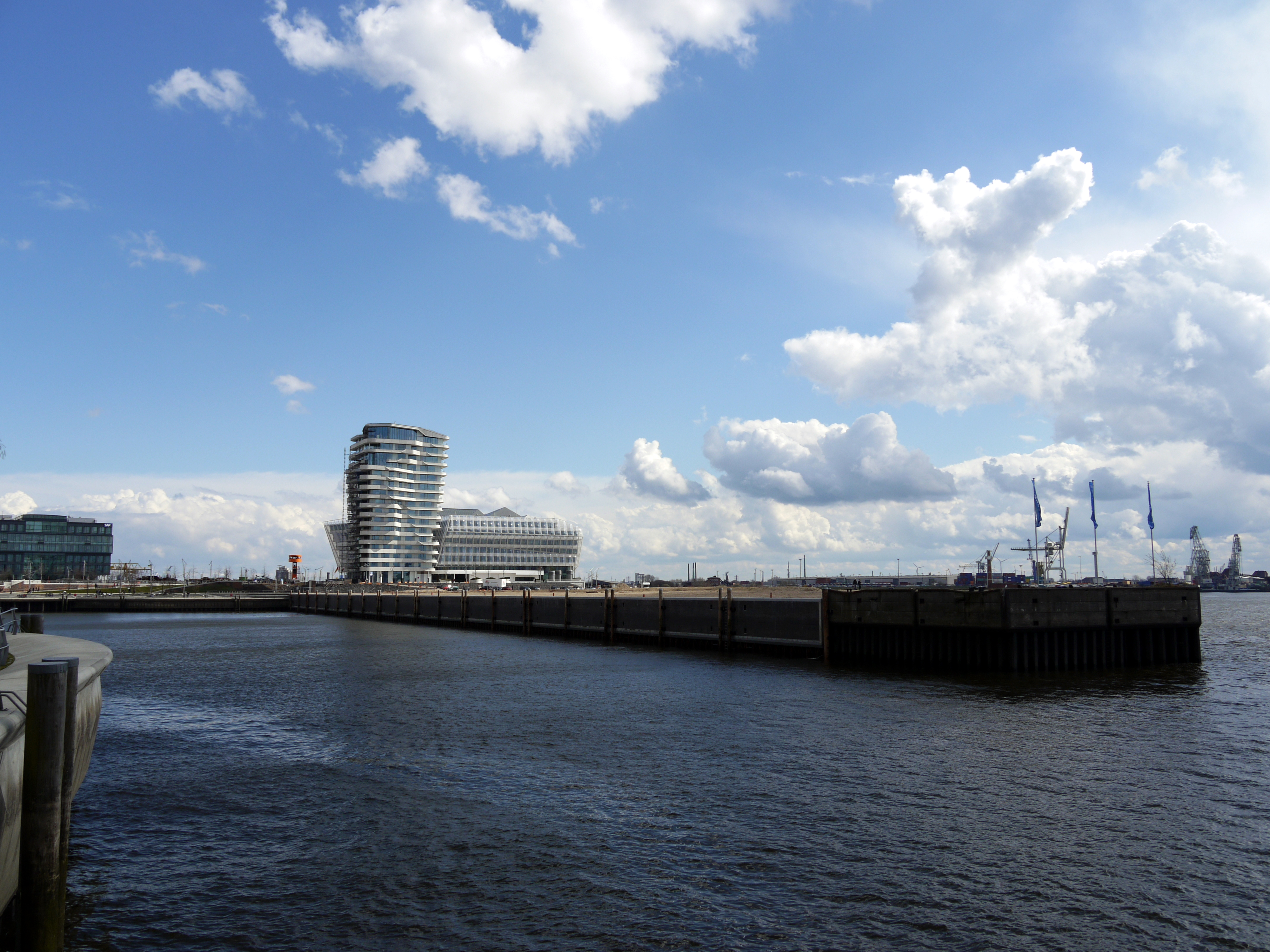 Strandhöft mit dem Hübenerkai am Grasbrookhafen in der HafenCity in Hamburg, April 2010.